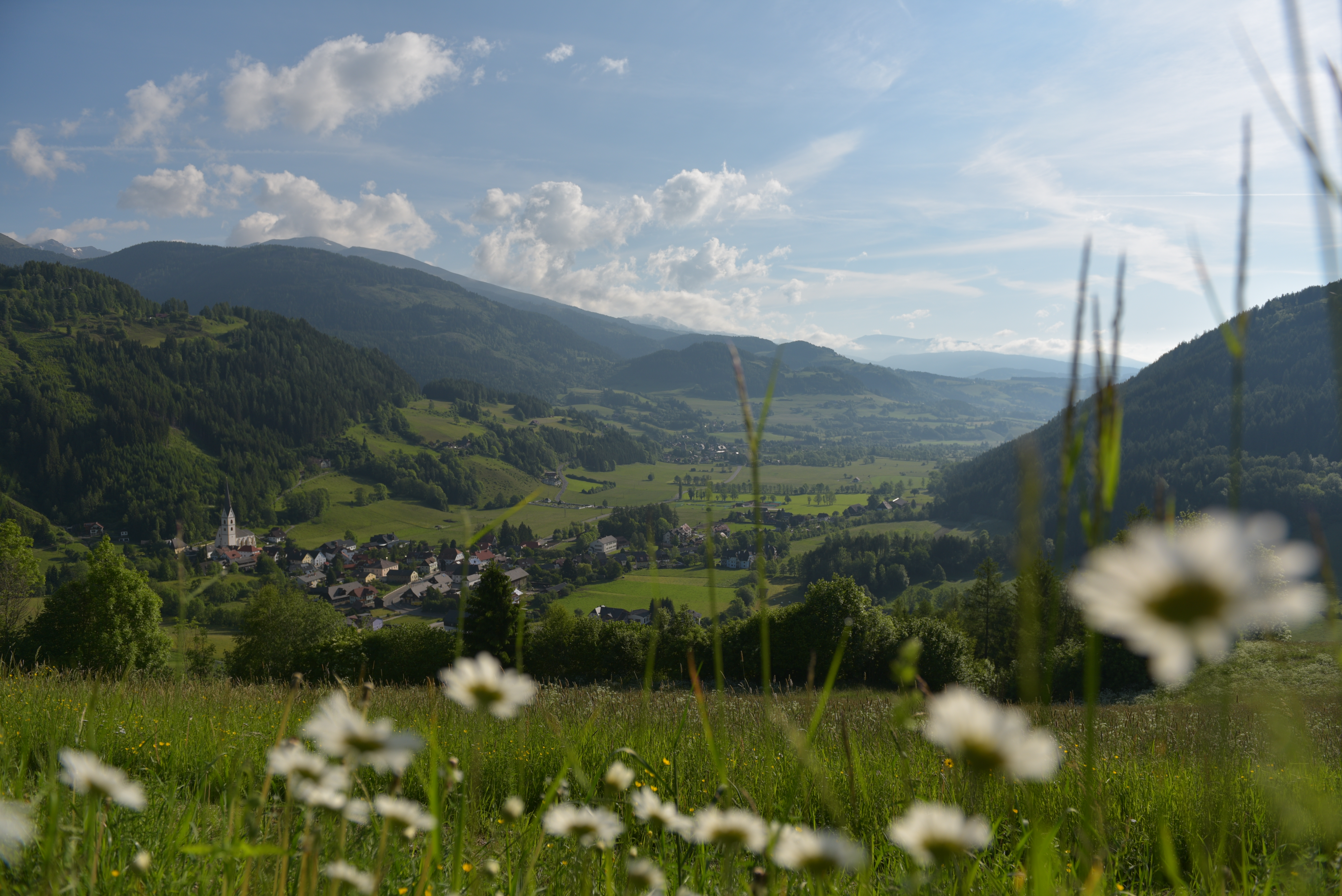 Ansicht des Ortskerns von Schöder, Steiermark mit Blick Richtung Katschtal und den Ortsteil Baierdorf